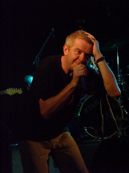 Kytarista a zpěvák Mňágy Petr Fiala během koncertu v olomouckém U-klubu.